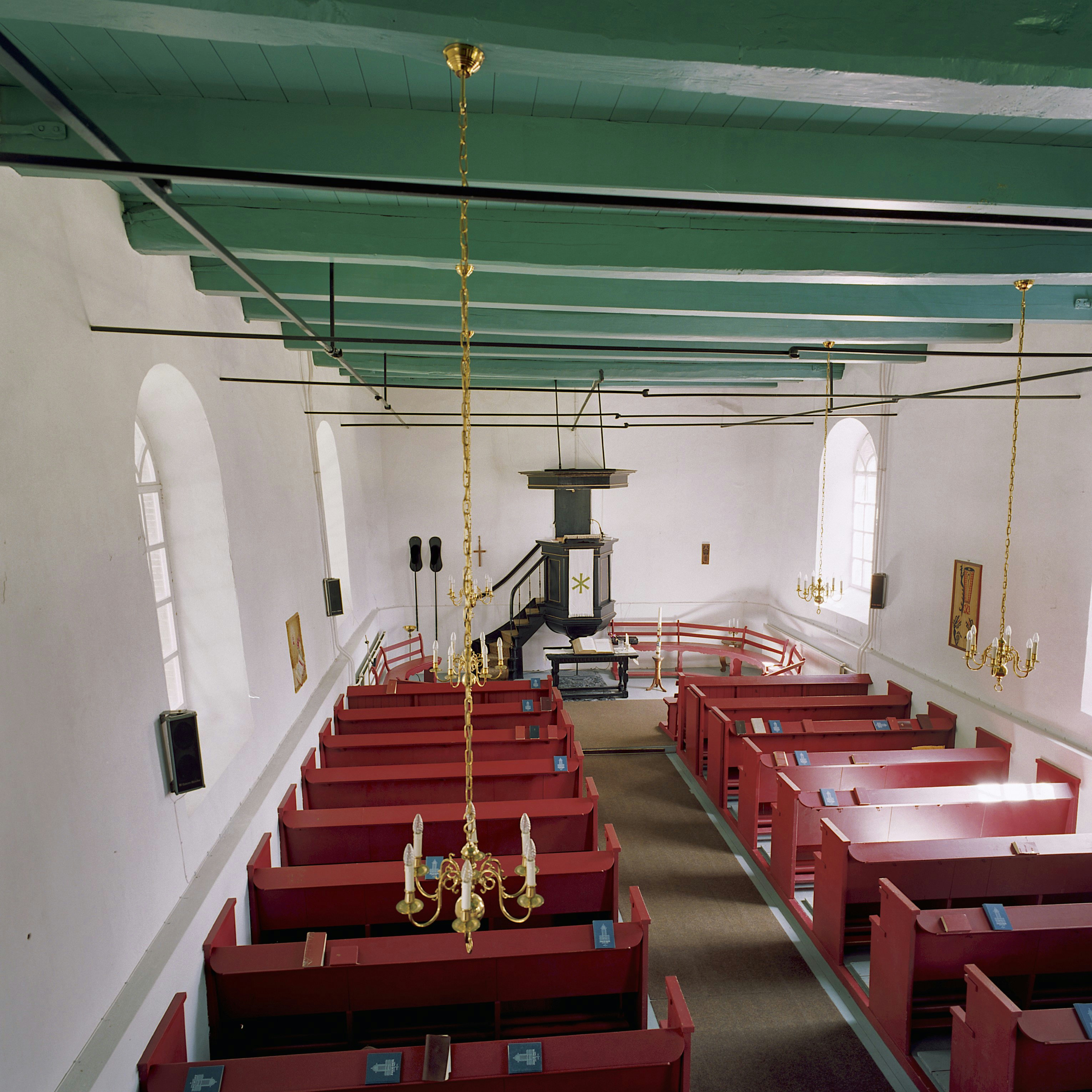 Nederlands Hervormde Kerk: Interieur, overzicht naar het oosten met preekstoel, gezien vanaf het orgelbalkon